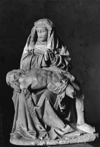 Pietà in der Kirche Saint-Seurin in Gabarnac